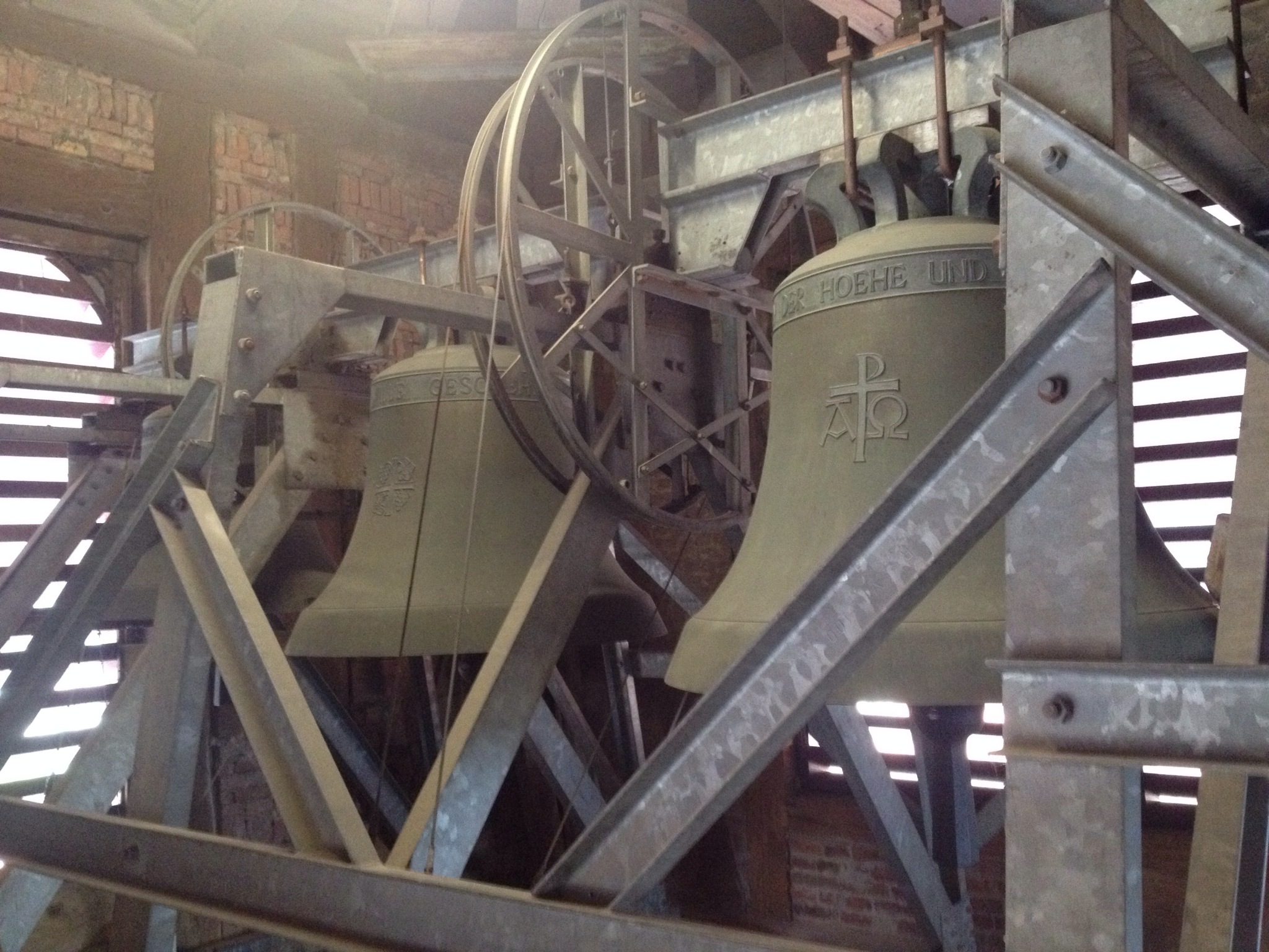 Glockenstuhl im Oberen Torturm in Neuenstadt am Kocher